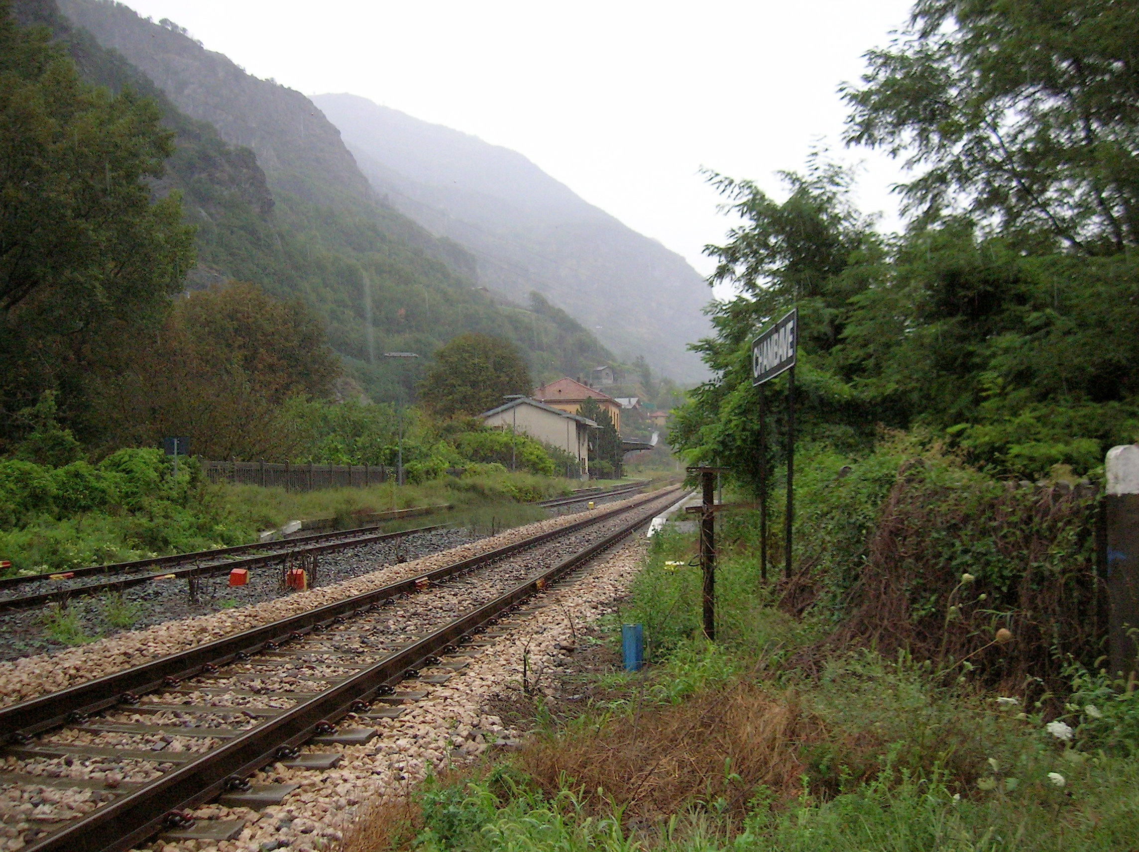 Stazione di Chambave, Chambave, Valle d'Aosta, Italia.